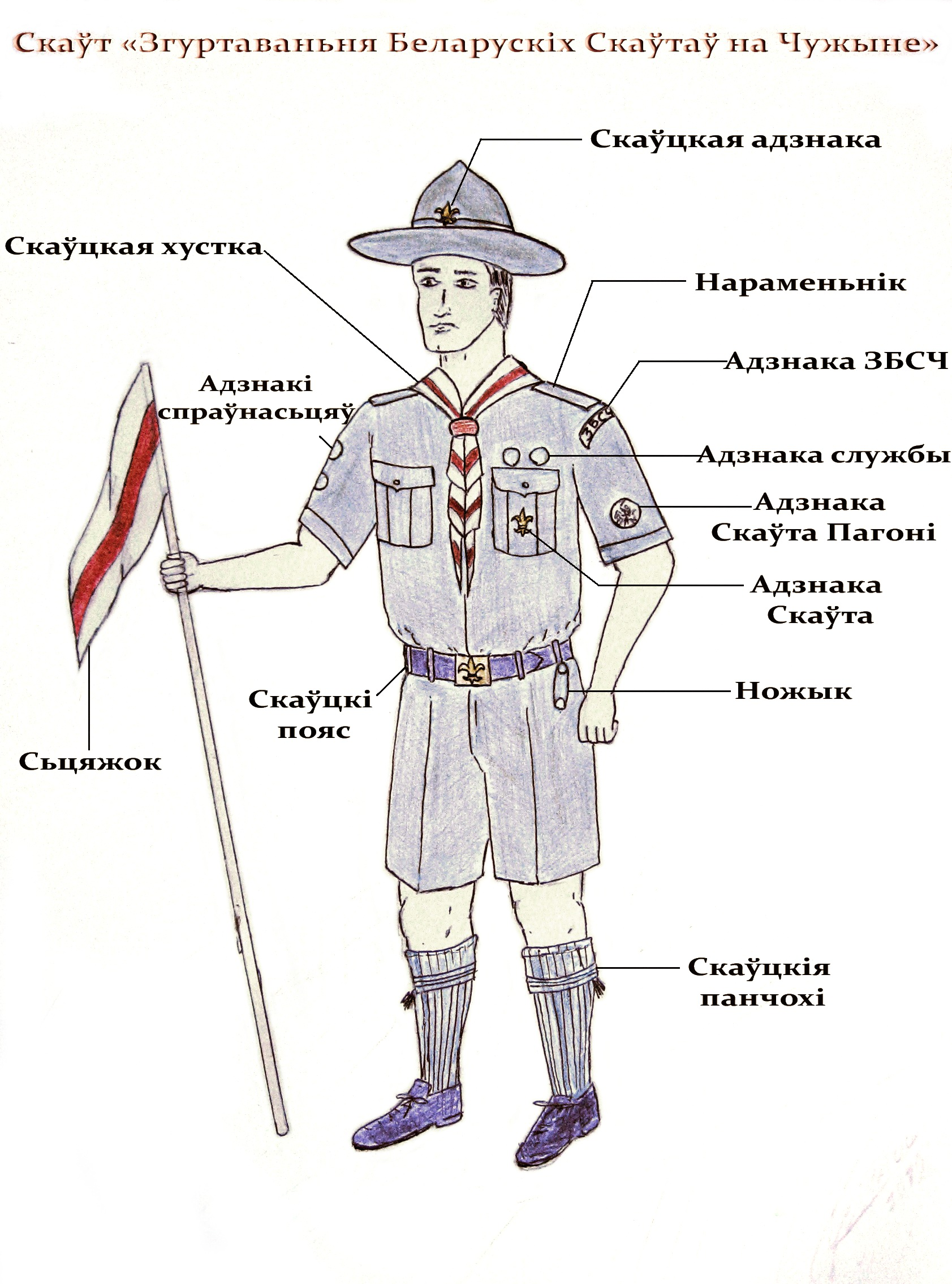 Беларуская (тарашкевіца): Скаўт «Згуртаваньня Беларускіх Скаўтаў на Чужыне». Малюнак Алега Грушэцкага па кніге ЗБСЧ «Скаўцкі спадарожнік», 1947г.